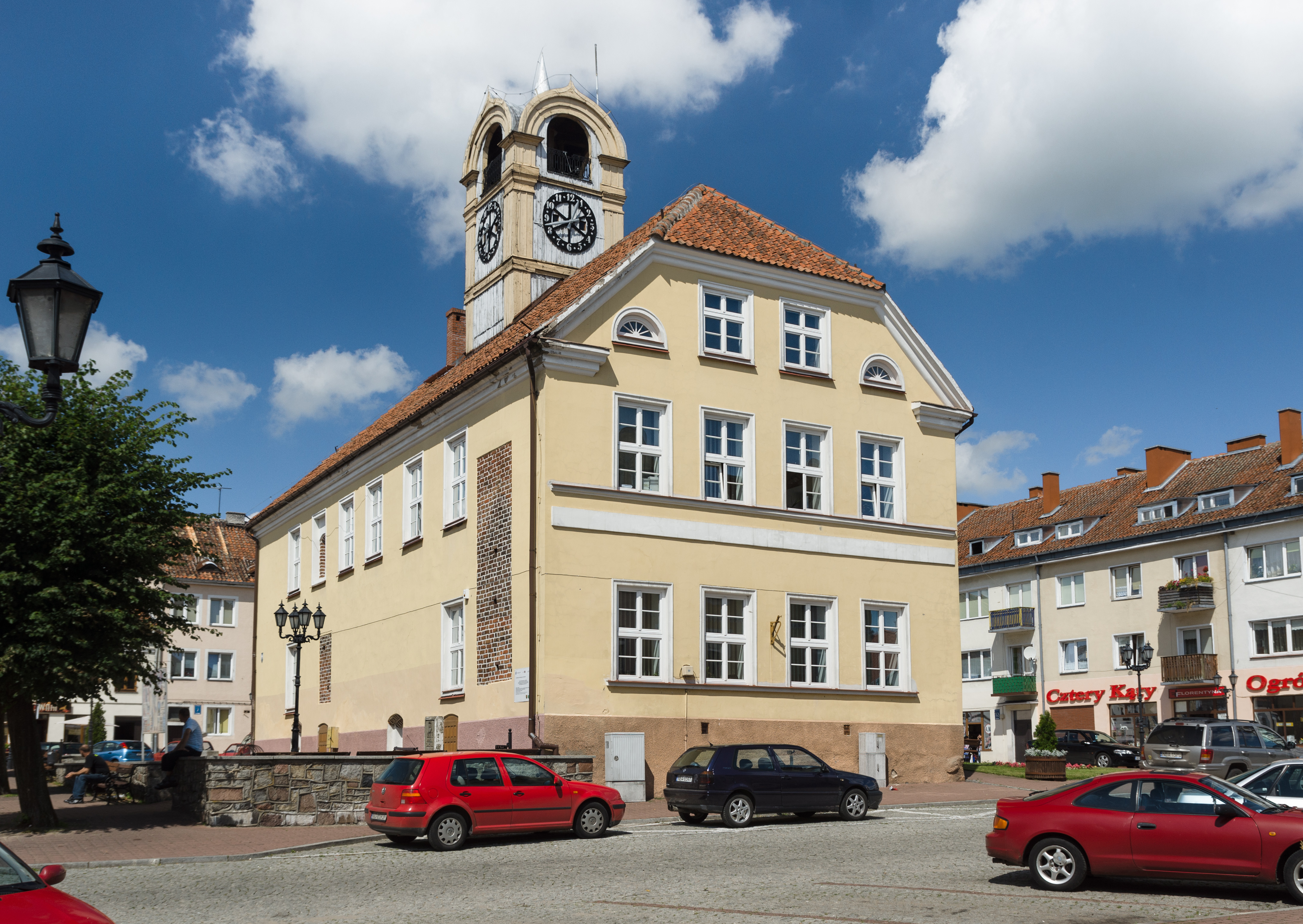 Ratusz w Górowie Iławeckim.